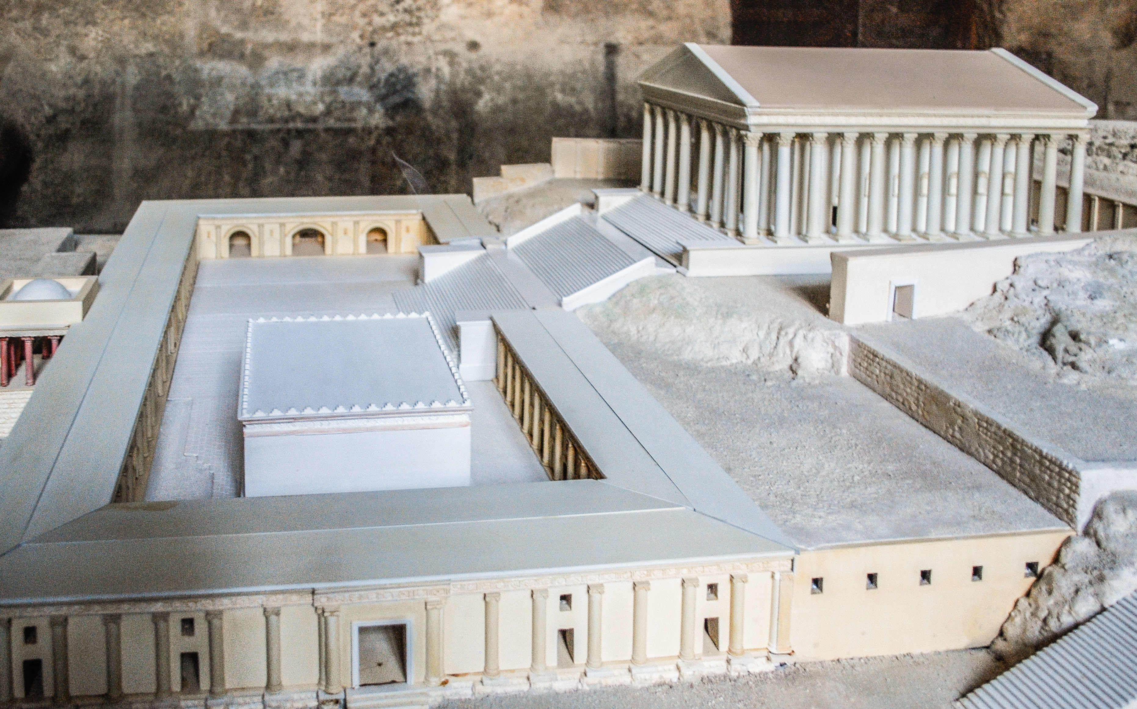 Maquette du temple de Zeus dans le musée archéologique du site de Jerash.